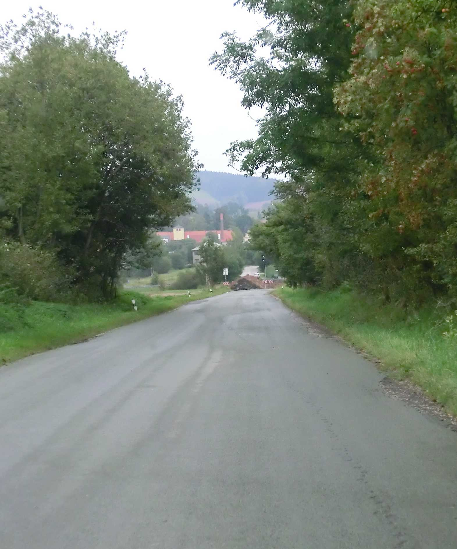 Silnice II/286 prudce klesá k Jilemnici. Původně vedla téměř přímo až na jilemnické náměstí, od 80. let je odkloněna vpravo na obchvat a doprava v původní stopě byla prakticky zrušena.